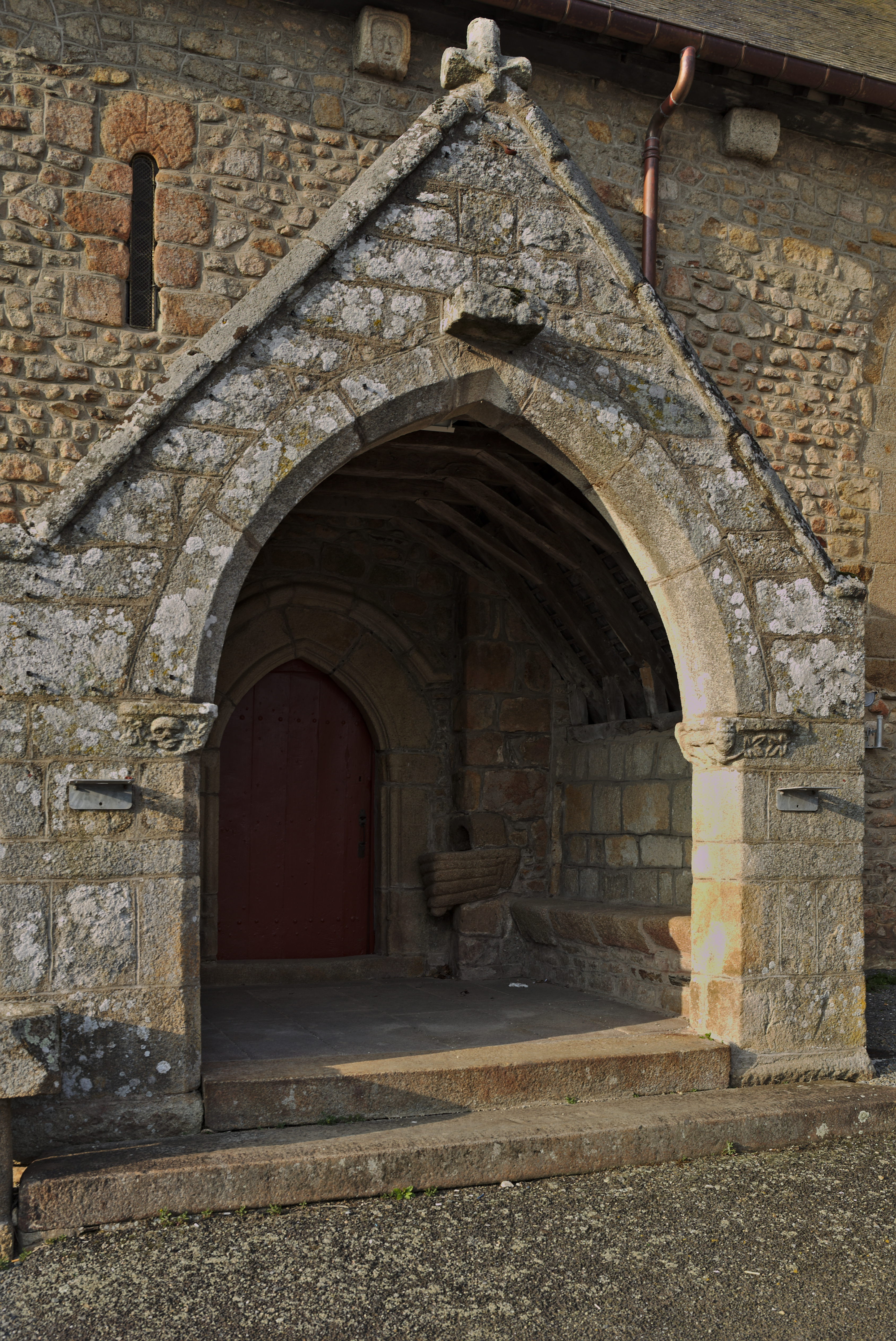 Église priorale Saint-Martin de Tremblay : porche sud.